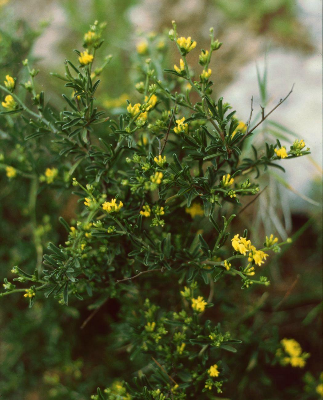 Anthyllis hermanniae, Hülsenfrüchtler (Fabaceae), Schmetterlingsblütler (Faboideae) – Griechenland/Ελλάδα/Greece: Akra Lardhigos S Argostoli/Αργοστόλι (Kefallinia/Κεφαλληνία)